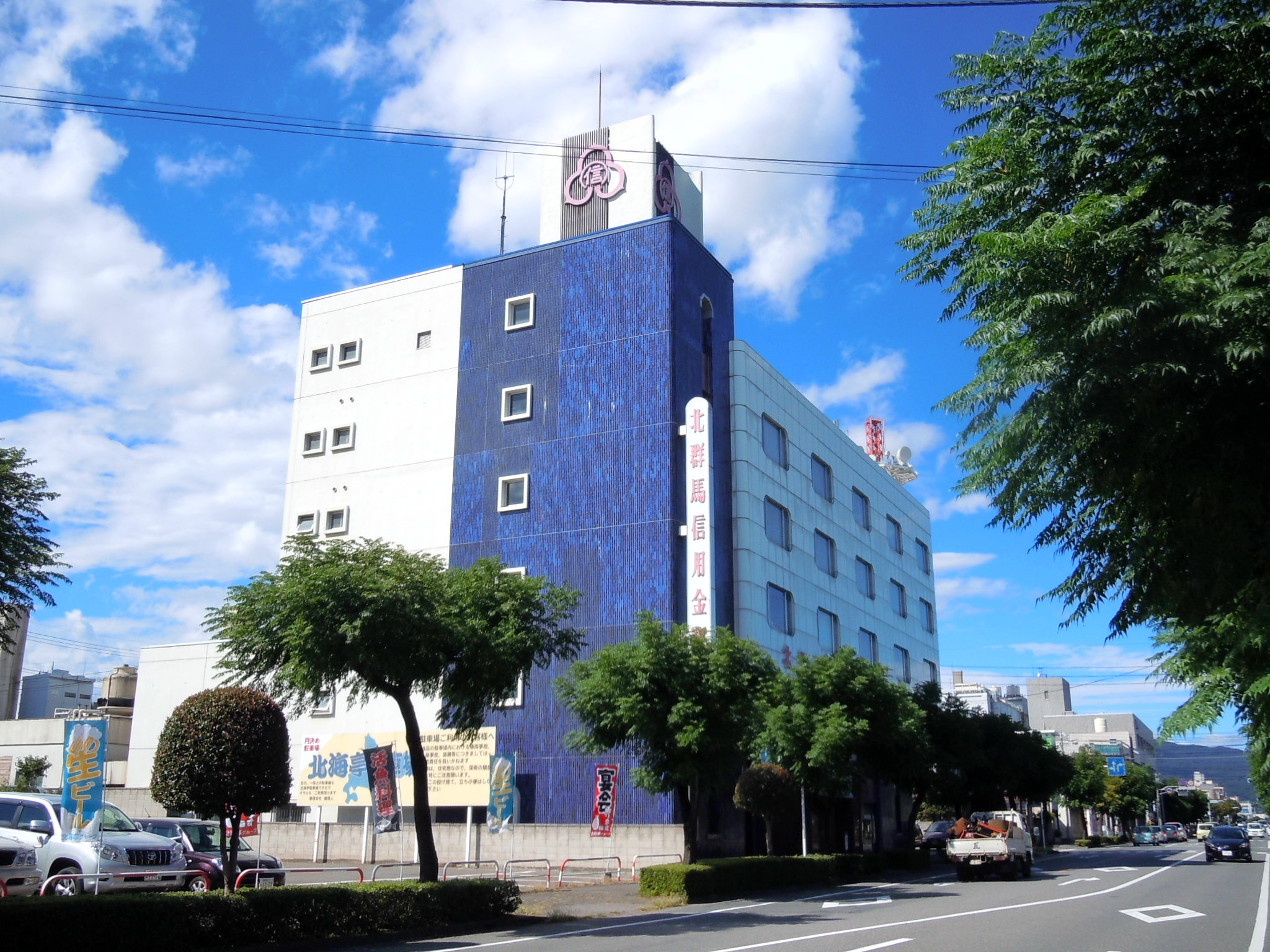 北群馬信用金庫本店